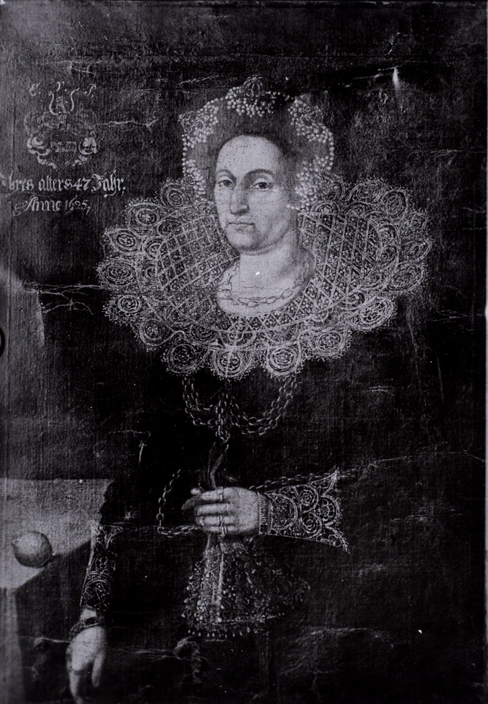 Elisabeth von Derfelden (sünd. Plate), Johann von Derfeldeni (1561-1633) abikaasa.